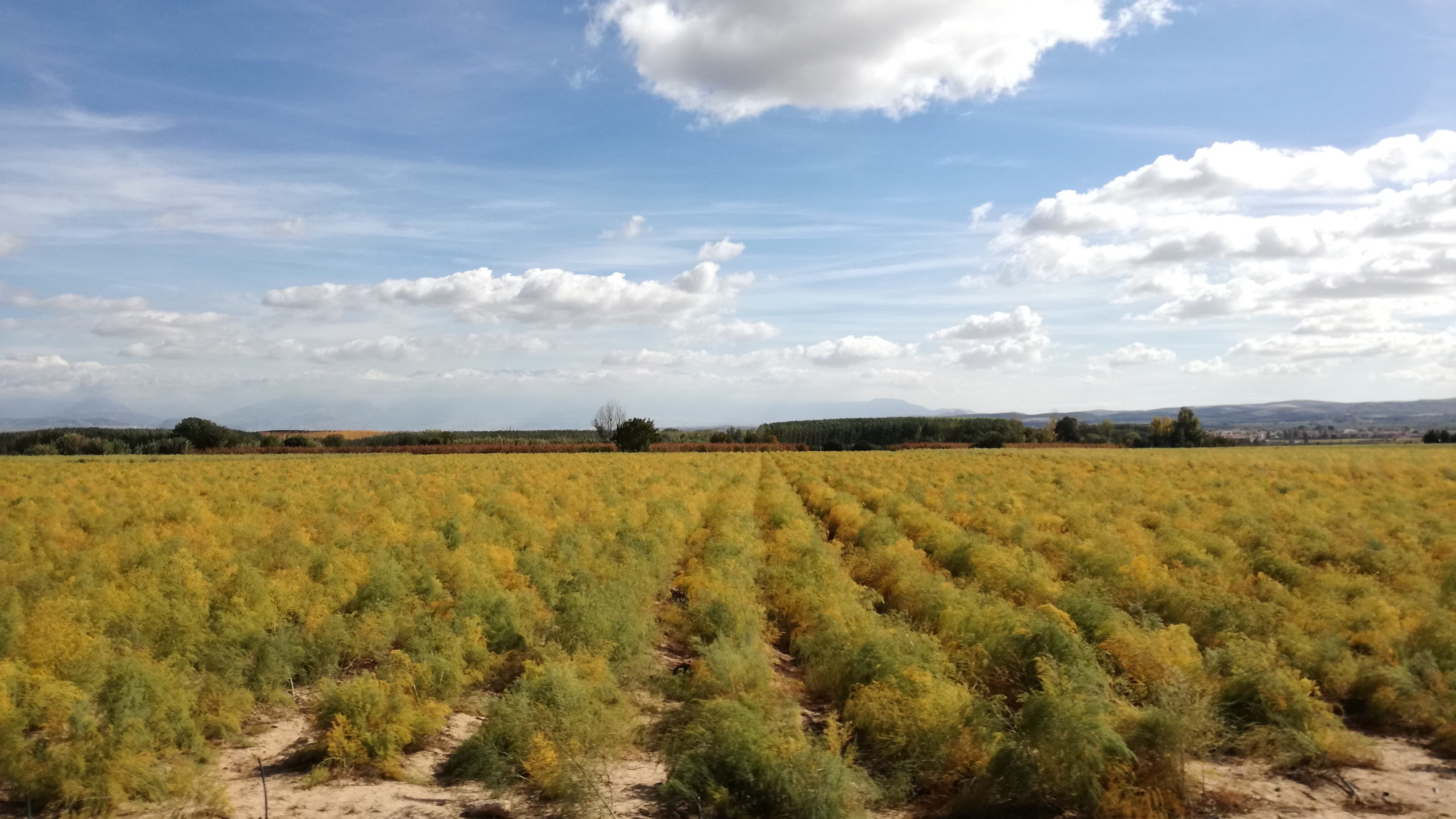 Entre 1905 y 1909 Vicenta Lorca vivió en Valderrubio junto a su esposo Federico García Rodríguez y sus hijos (Federico, Concha, Francisco e Isabel García Lorca). Estas tierras de cultivo fueron propiedad de la familia García Lorca a finales del siglo XIX y principios del siglo XX.